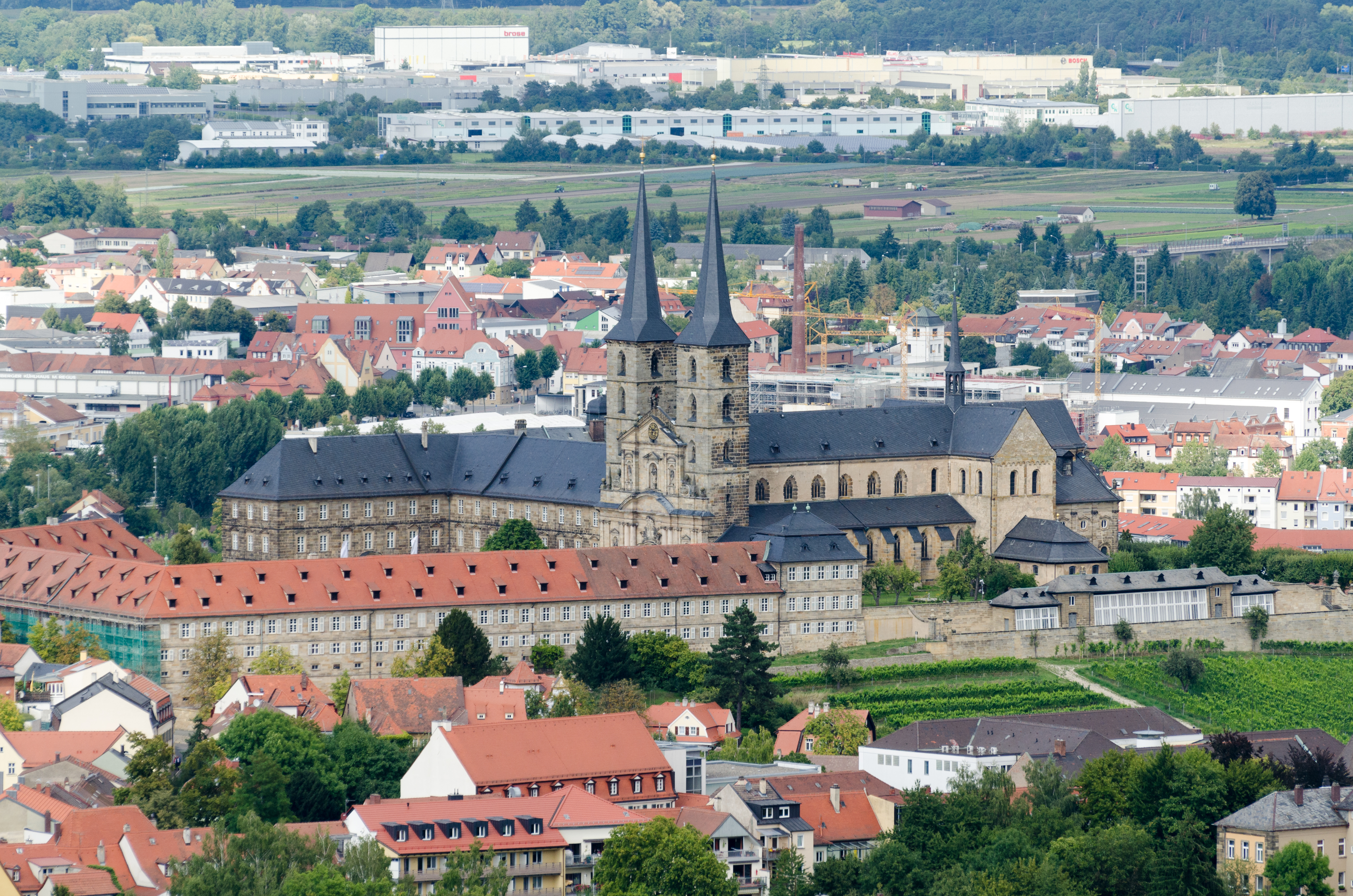 Bamberg, St. Michael, von der Altenburg gesehen